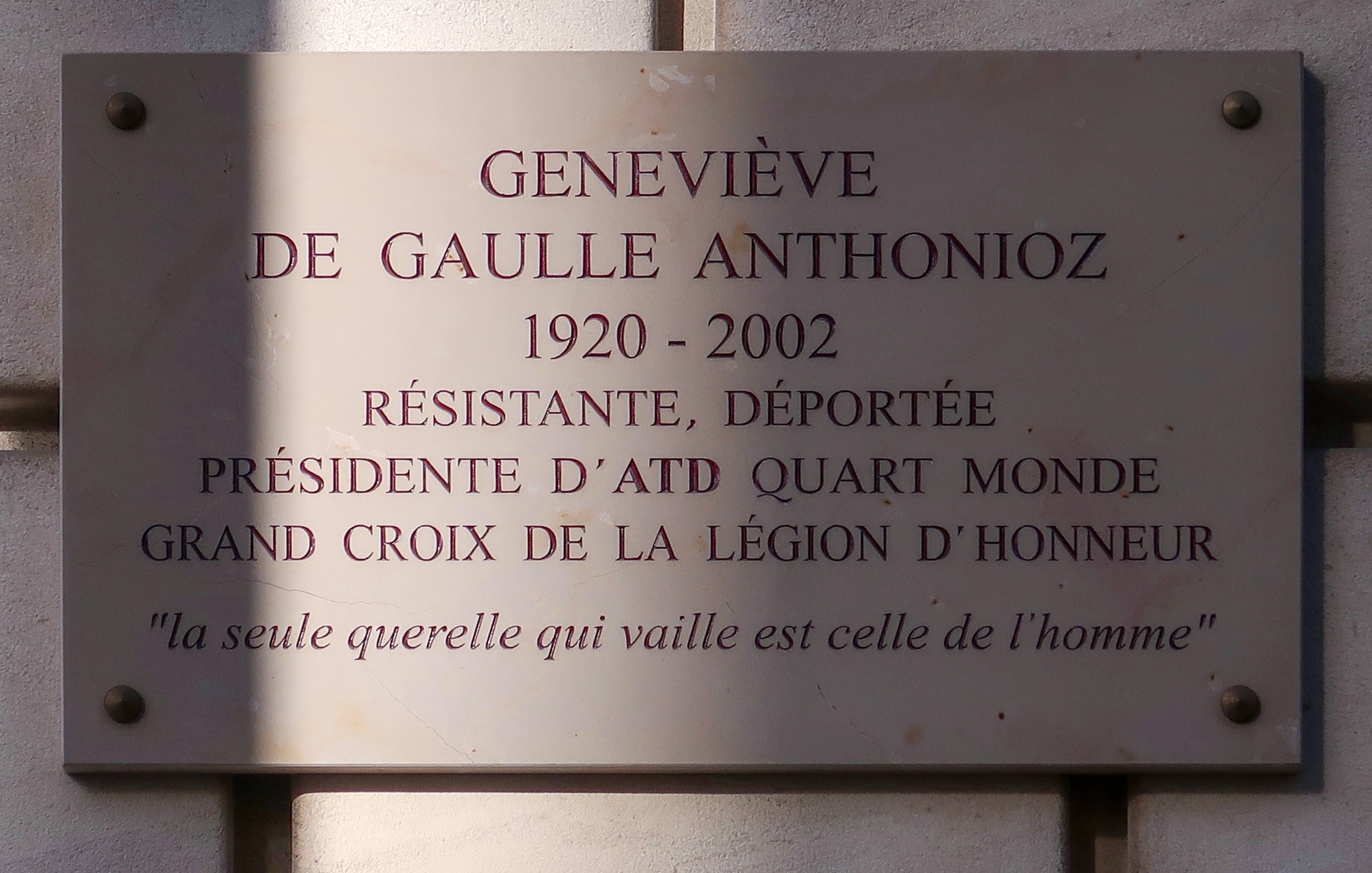 Plaque en hommage à Geneviève de Gaulle-Anthonioz, 4 rue Michelet (Paris, 6e).